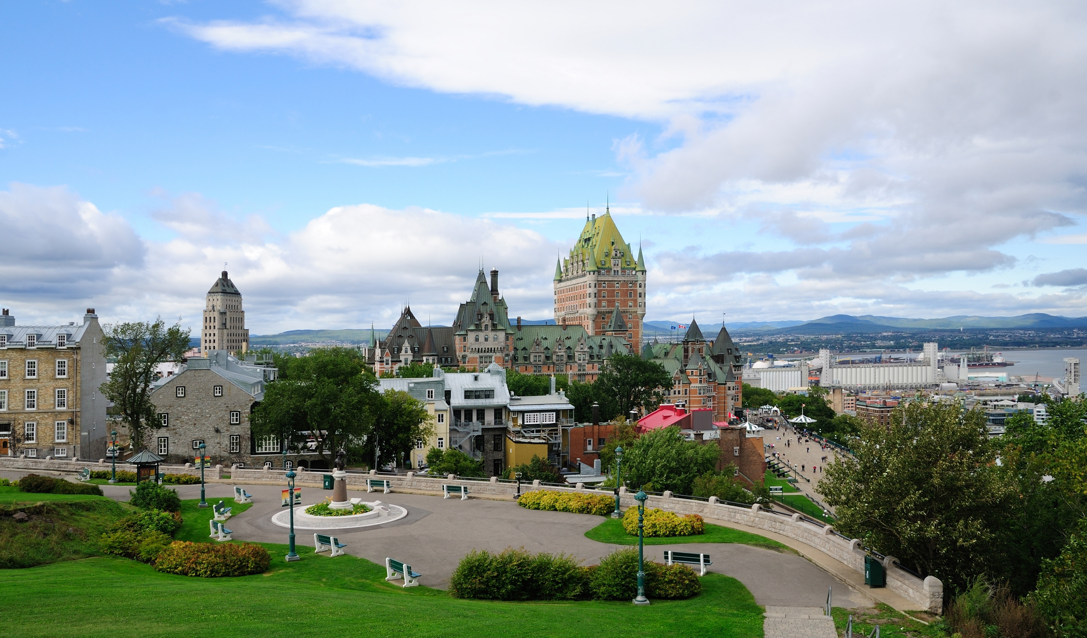 Arrondissement historique du Vieux-Québec vu de la citadelle, Ville de Québec, province de Québec, Canada. À gauche, l'édifice Price, au centre, le château Frontenac avec à droite, la terrasse Dufferin. Au fond, à droite, le fleuve Saint-Laurent. L'arrondissement figure depuis 1985 sur la liste du patrimoine mondial établie par l’UNESCO.